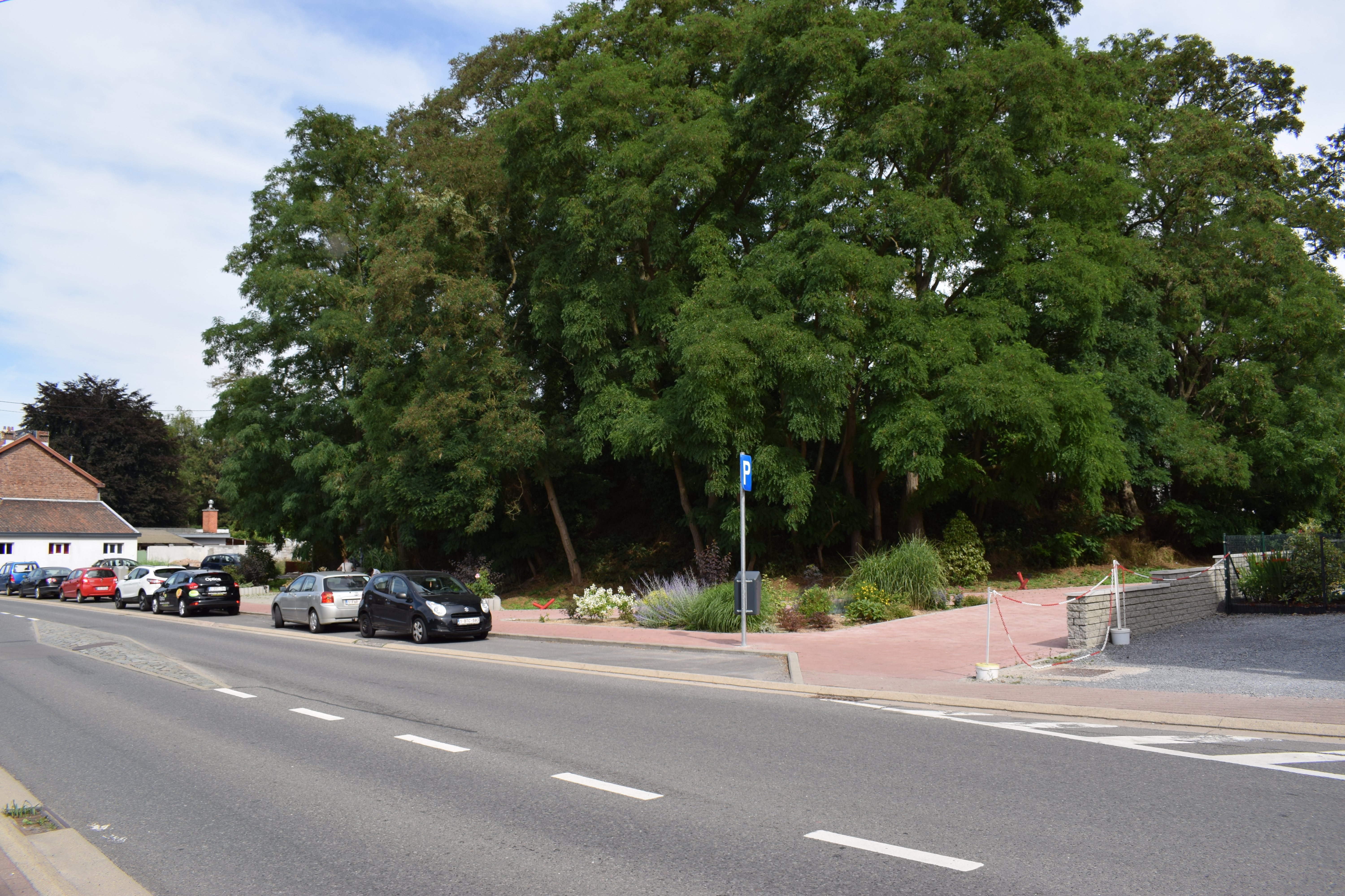 Vue du village de Liers, dans la commune de Herstal (province de Liège, en Belgique).